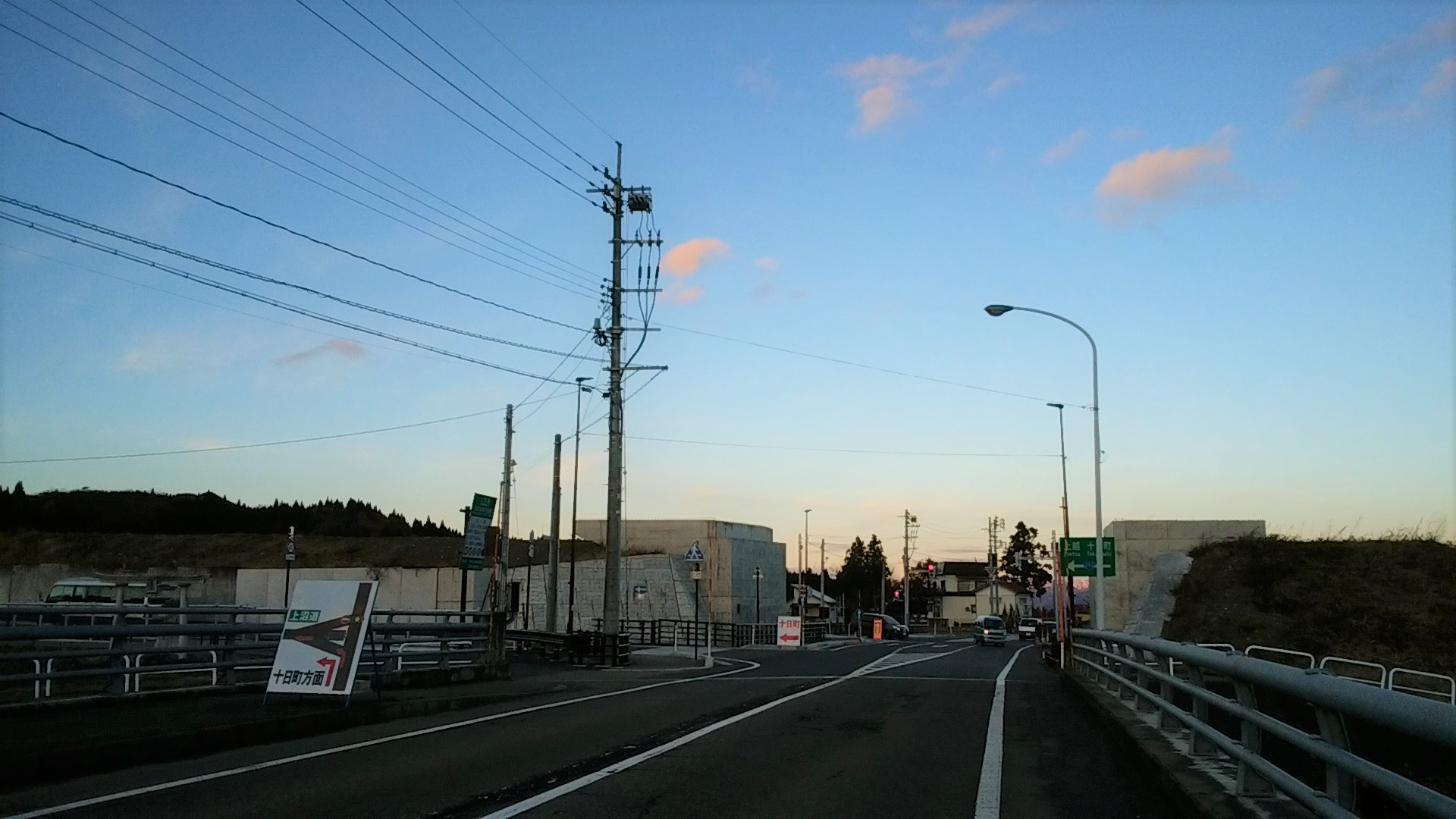 野田インターチェンジの交差点部。